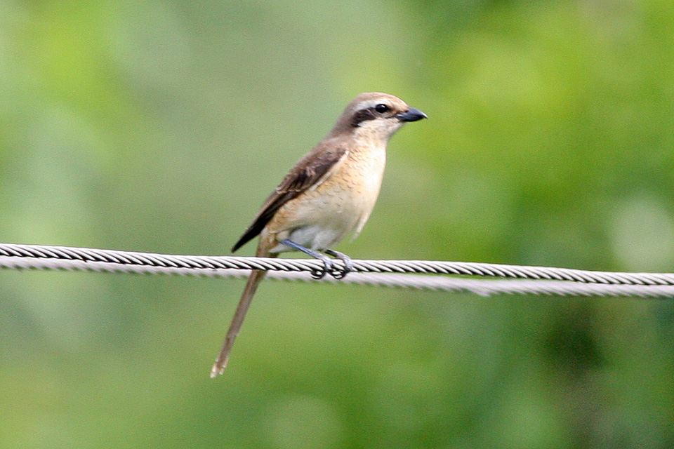 Hong He Gu, Shaanxi